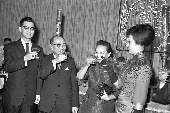 1964年2月6日，行政院院長嚴家淦（左二）在圓山大飯店為連戰（左一）、方瑀（右一）證婚。